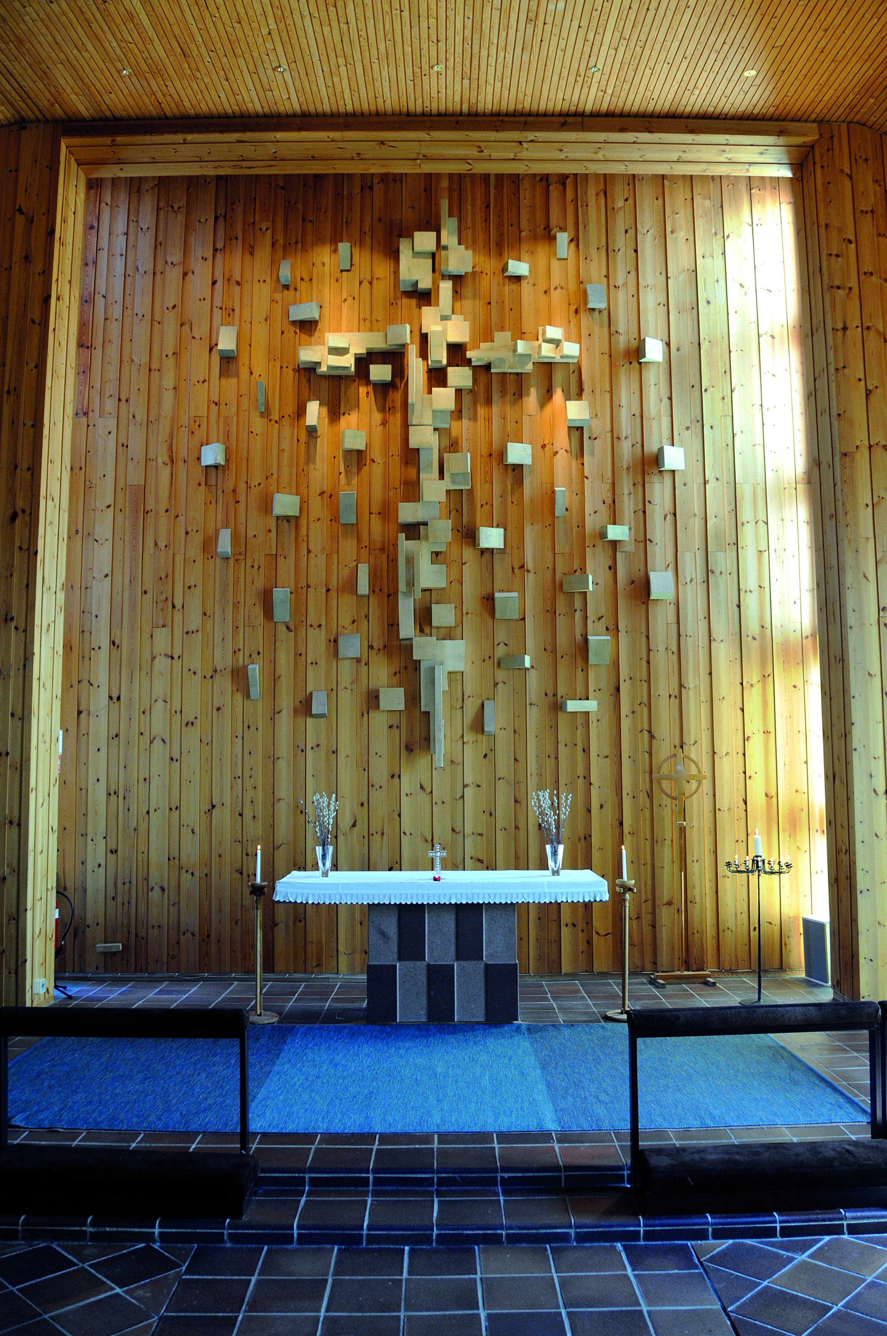 Tumba kyrkas altarvägg består av ett träkors i bitar.